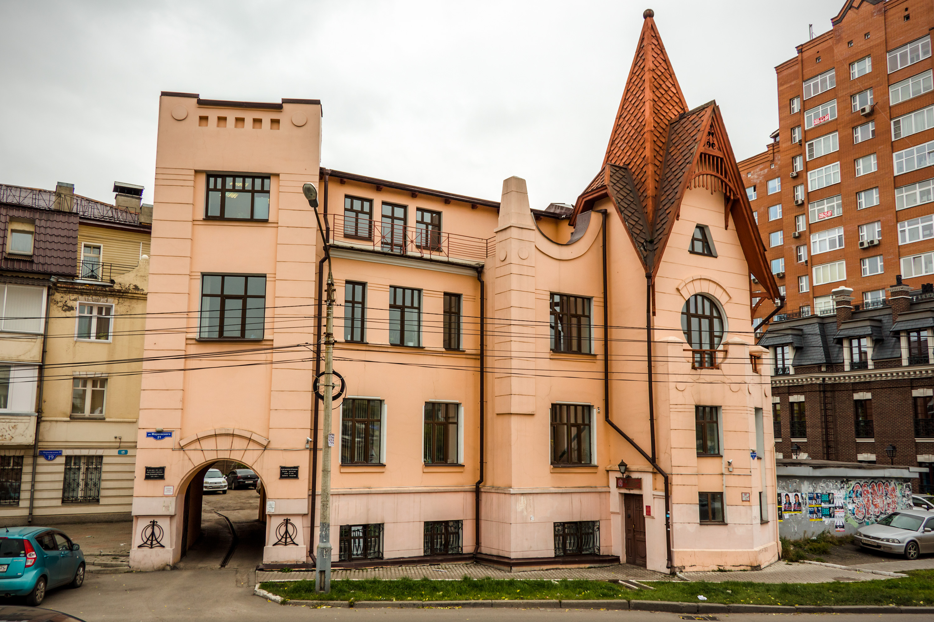 Усадьба Чернышова: улица Марковского, 21, Красноярск, Красноярский край